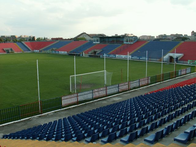 Stadionul Municipal Oradea - Tribuna I vazuta din Peluza Nord